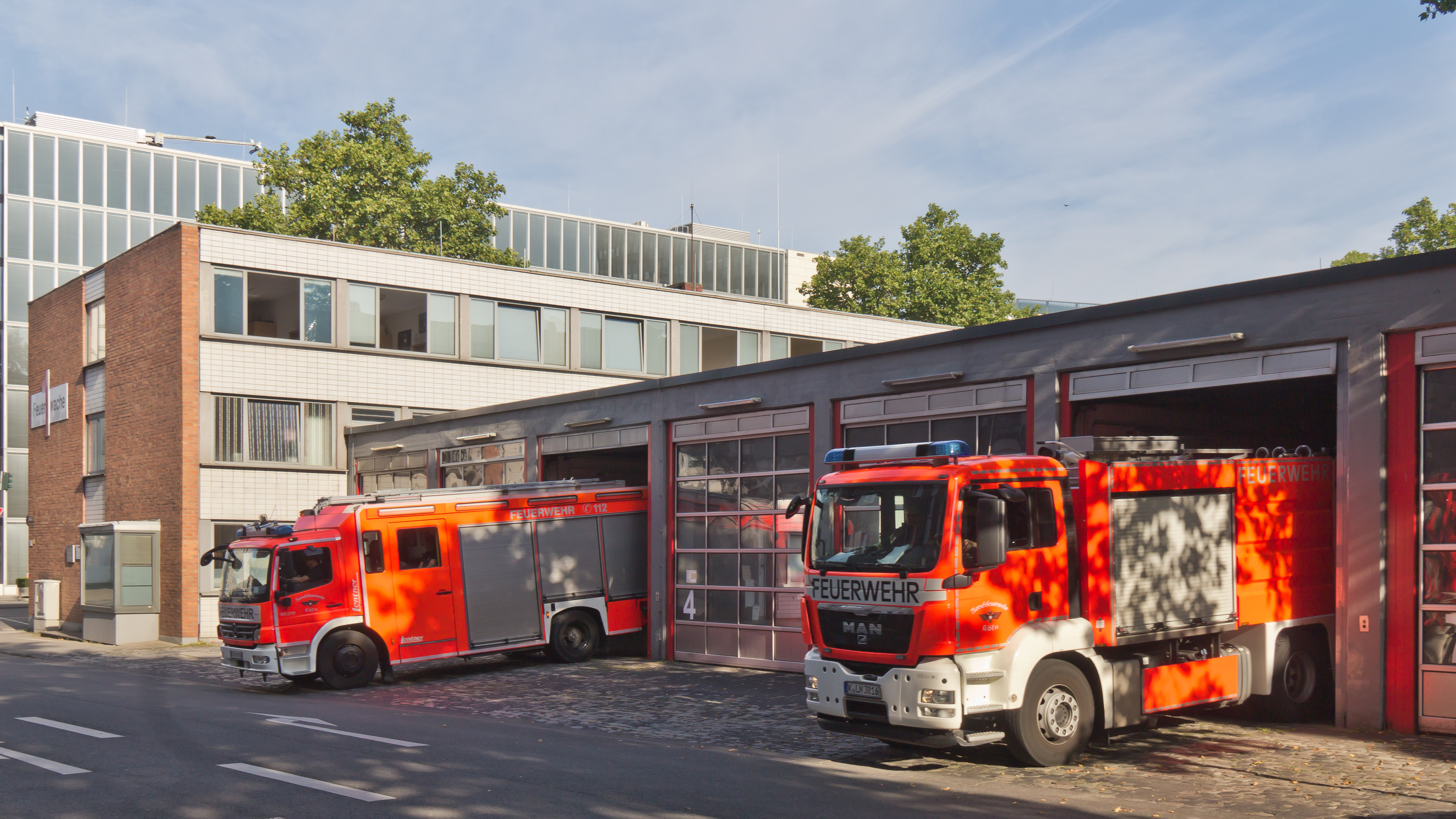 Feuerwehrwagen an der Feuerwache 1, Köln